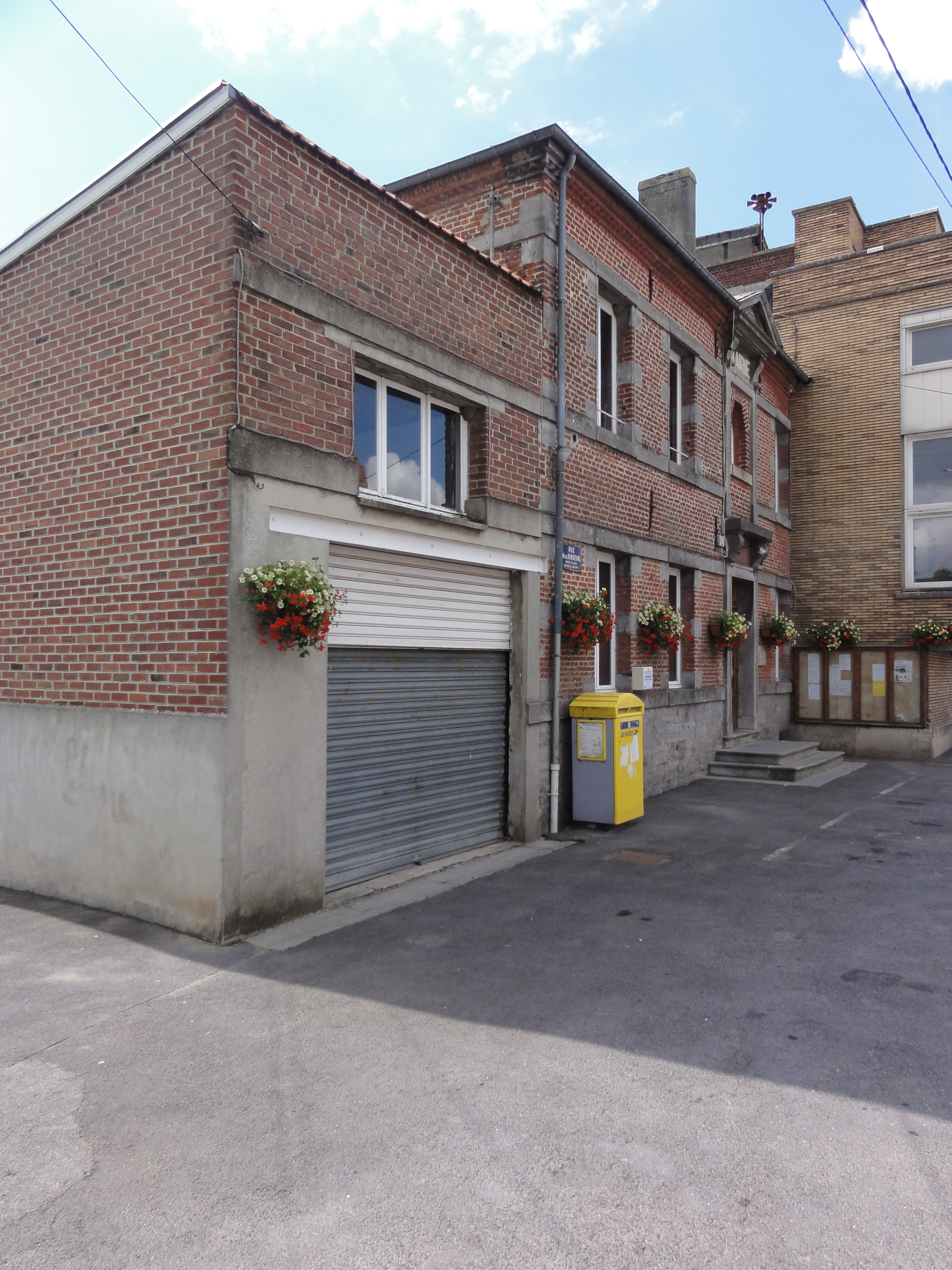 Leval (Nord) mairie